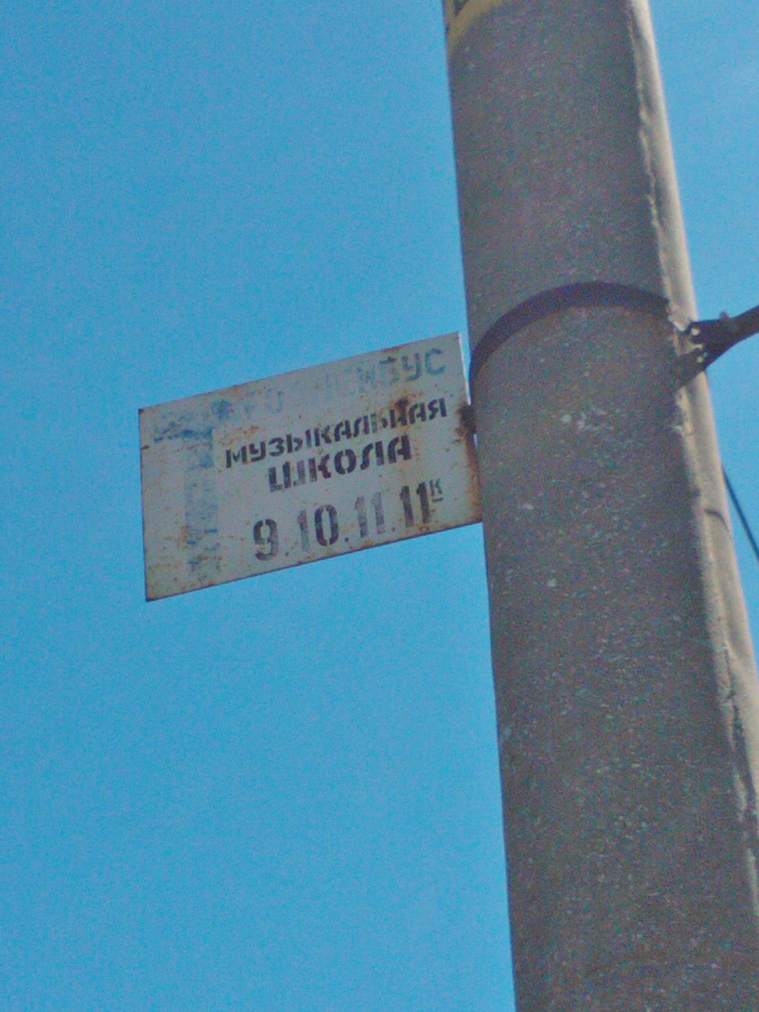 Маршрутоуказатель на остановке "Музыкальная школа".